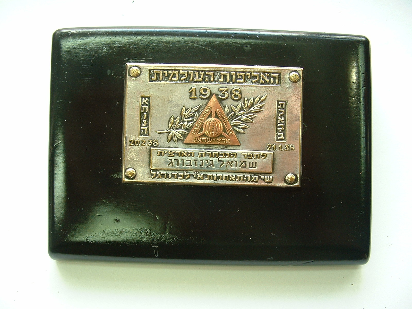 מגן שקיבל מילה גינזבורג על השתתפותו במוקדמות גביע העולם ב-1938